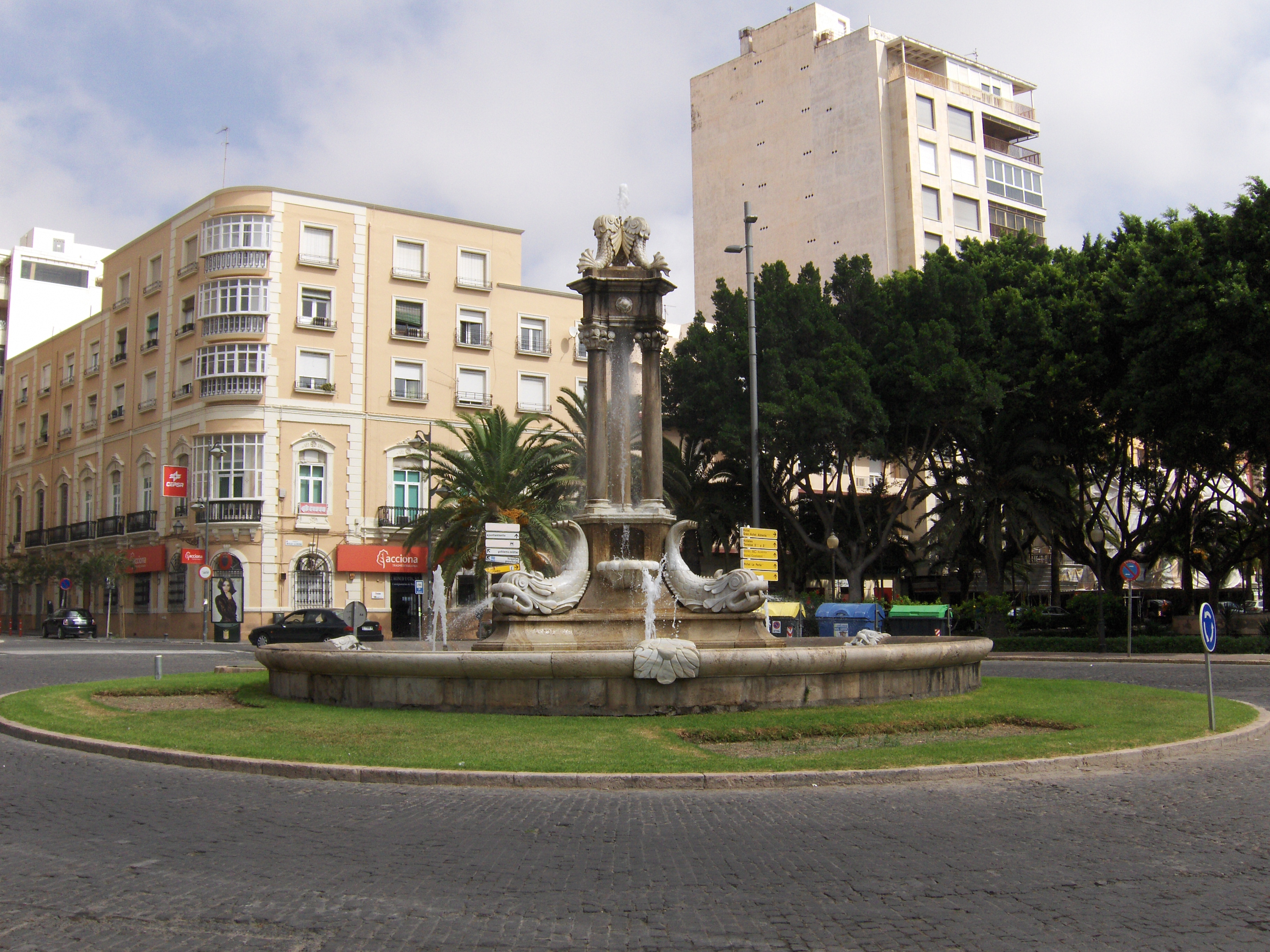 Fuente de los Peces, en el Parque Nicolás Salmerón, en Almería